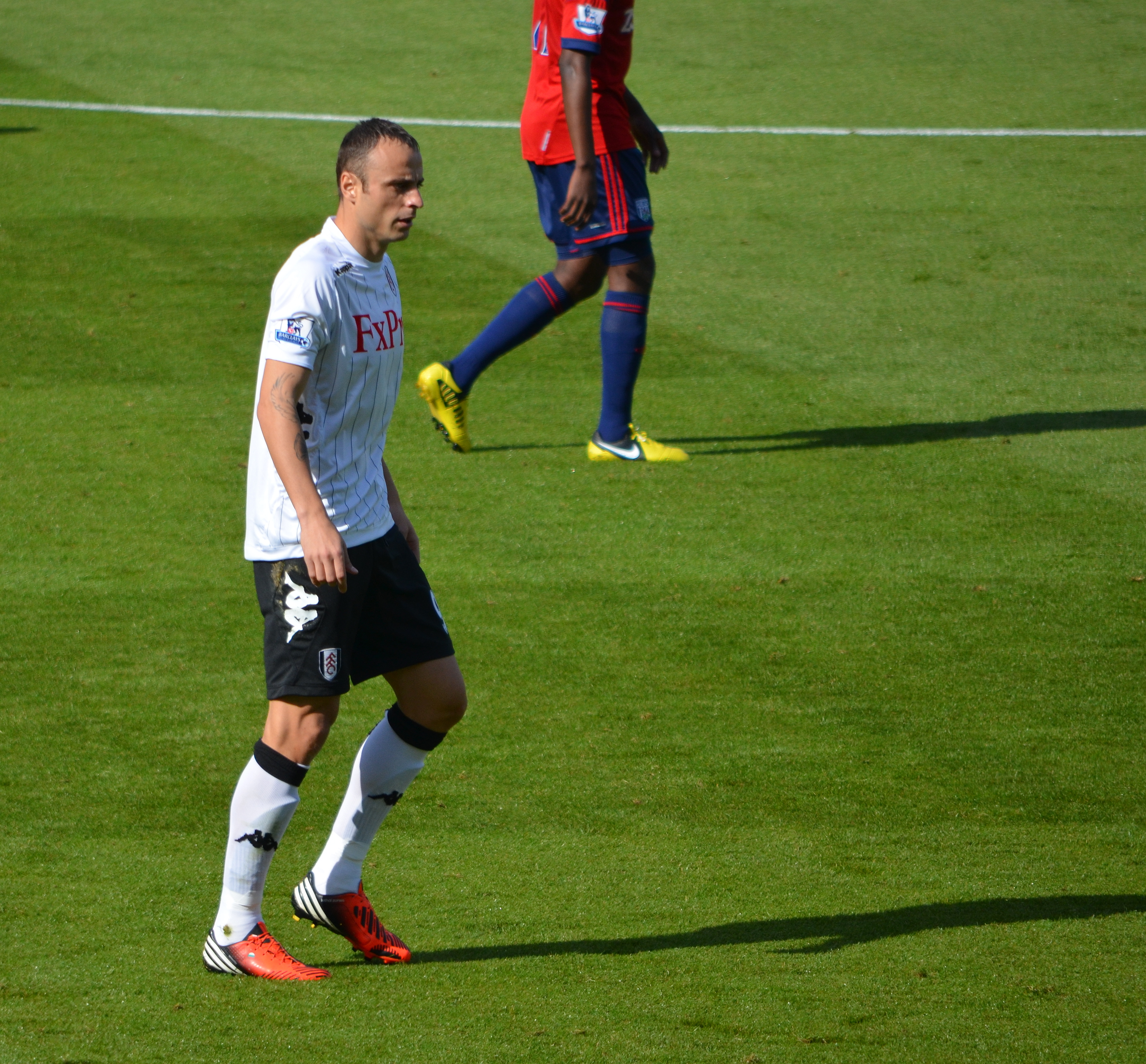 Berbatov